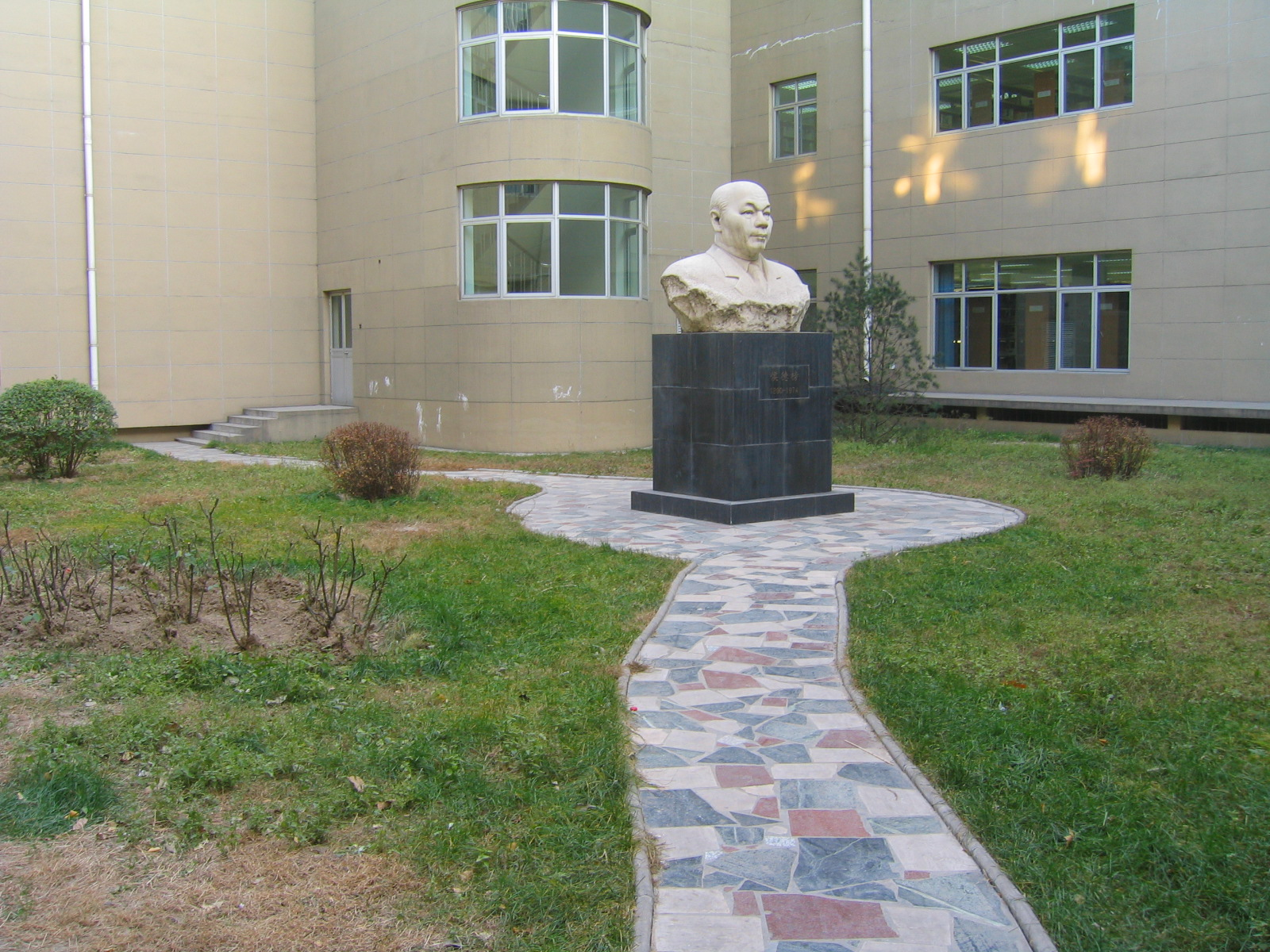 北京化工大学東校区的侯德榜胸像。